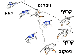 Neeskens vs Brazil 1974